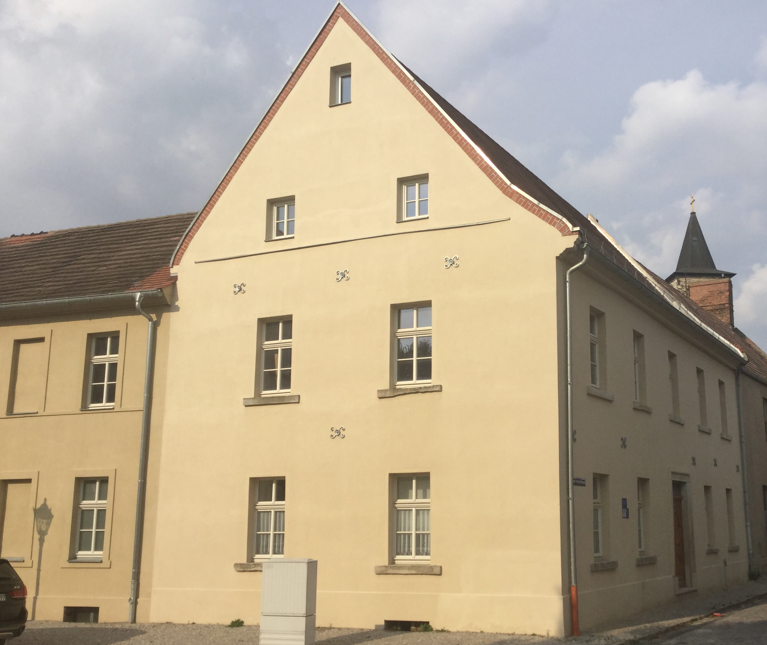 Haus Am Provianthaus 4 in Bernburg